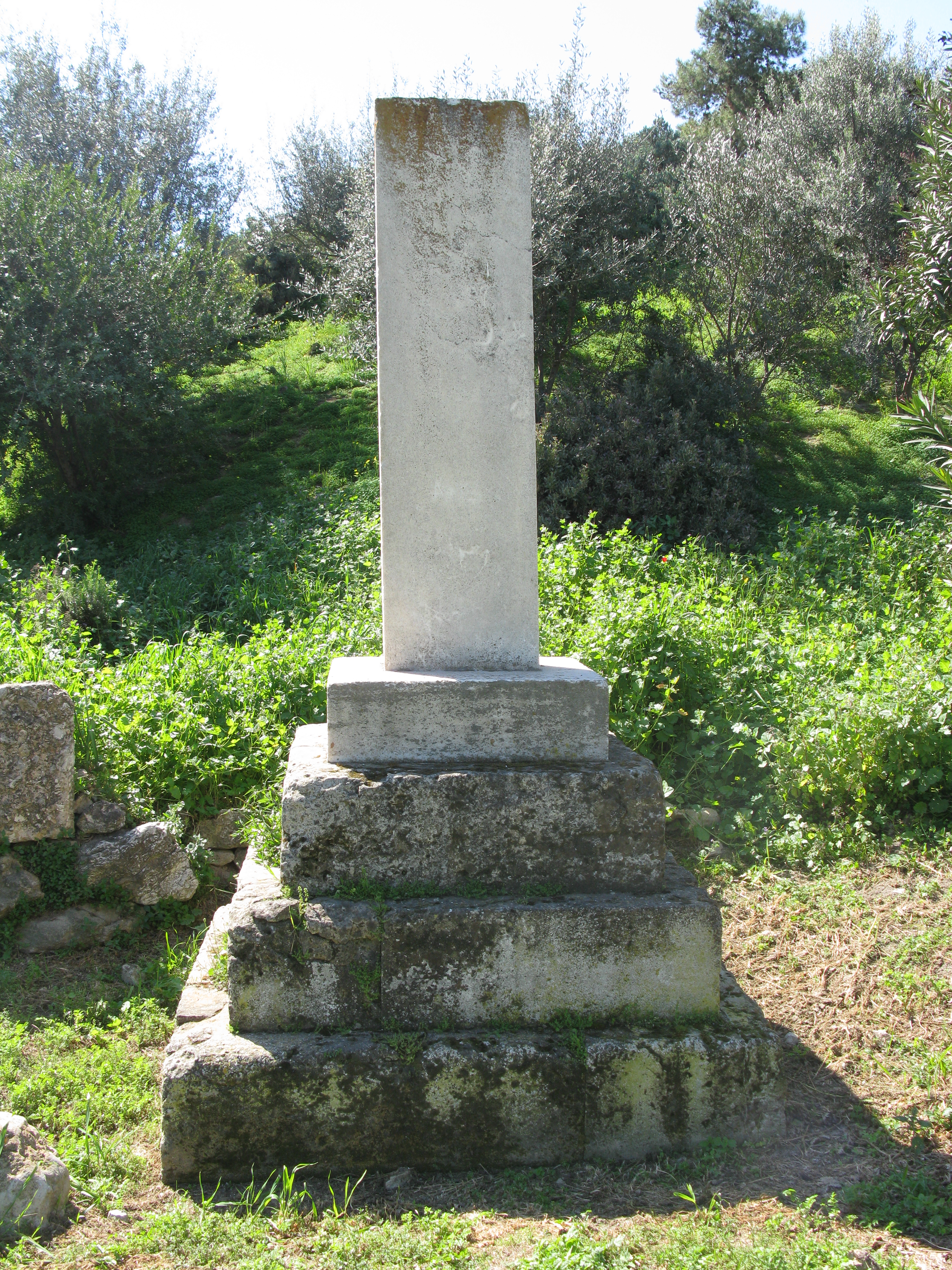 Κεραμεικός, Αρχαίο νεκροταφείο, Αθήνα.